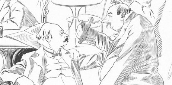 Zygmunt Skwirczyński Oskar Nedbal (rechts) 1911 links nn. Schmiedell